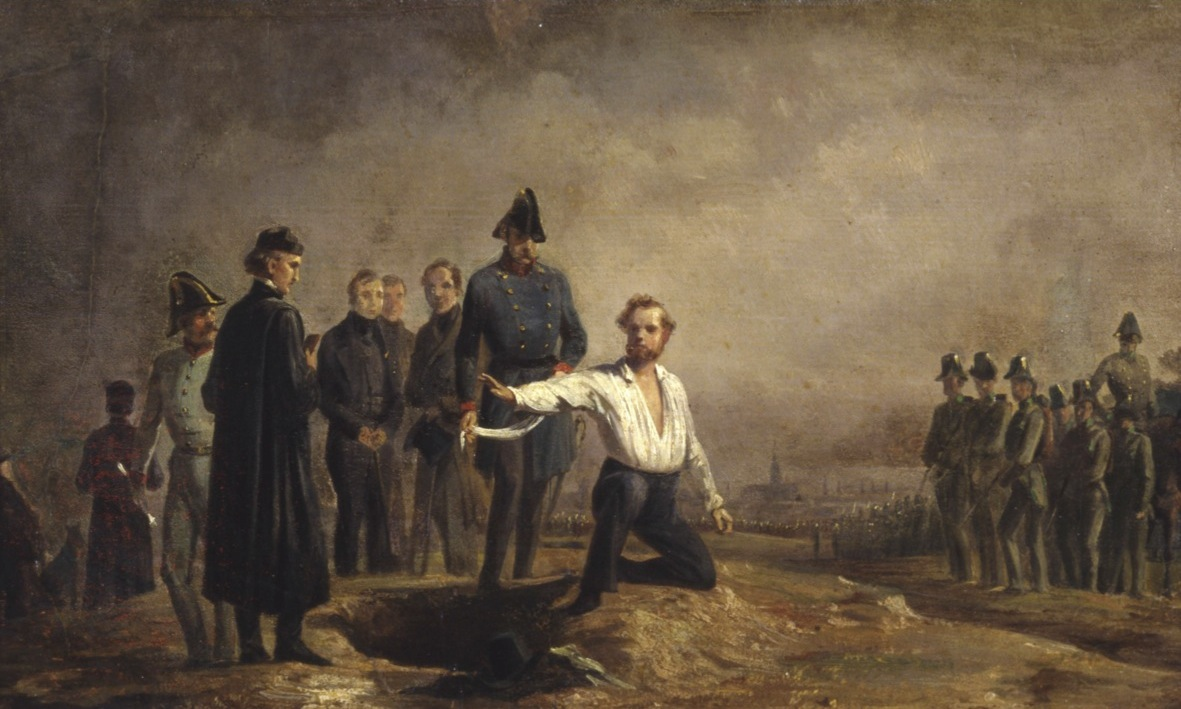 am 9. November 1848 auf der Brigittenau bei Wien